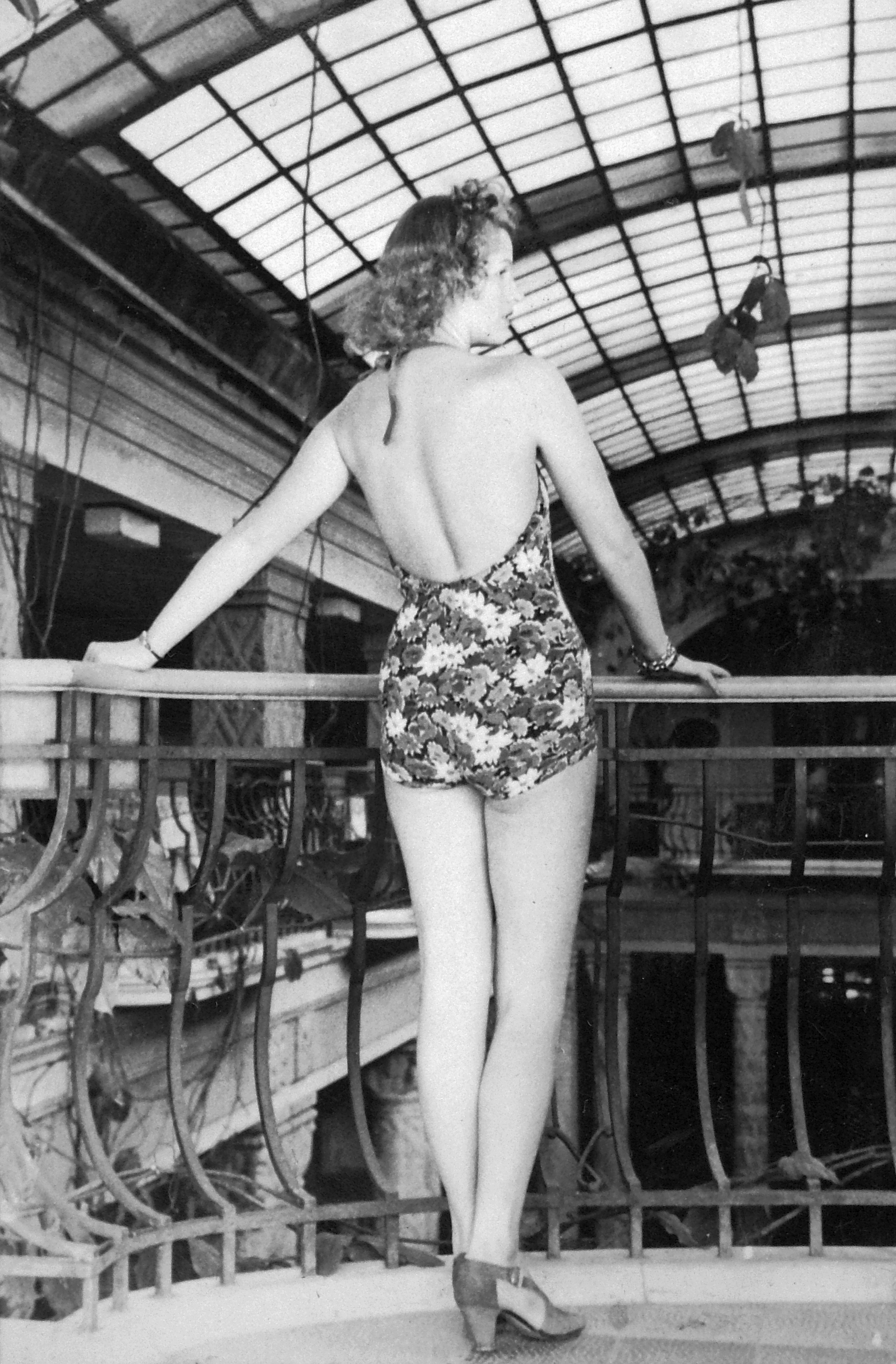 Szent Gellért Gyógyfürdő, Hidvéghy Valéria színésznő. Location: Hungary, Budapest XI. Tags: Budapest Title: Szent Gellért Gyógyfürdő, Hidvéghy Valéria színésznő.